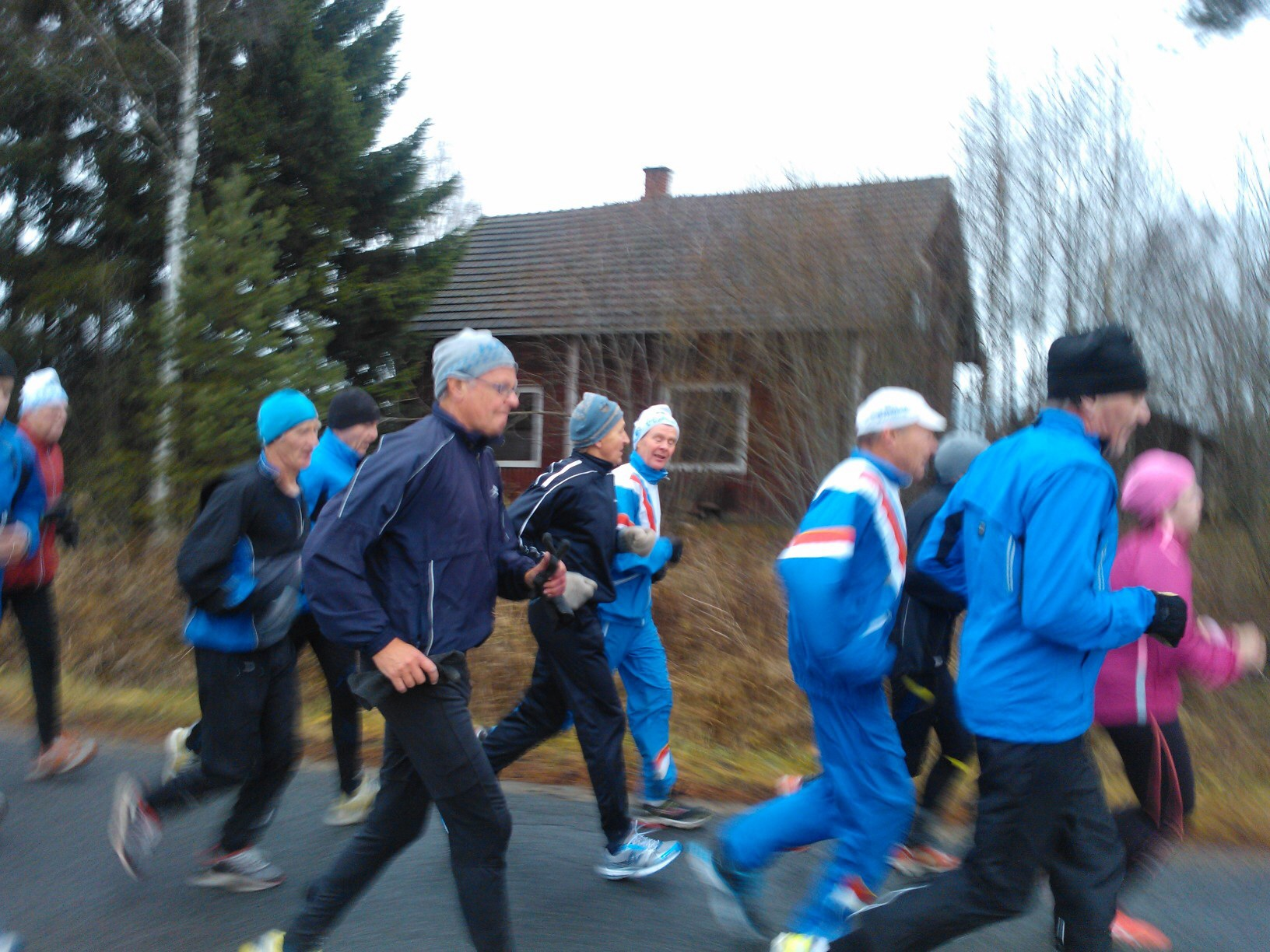 Häjyt kokouslenkillä